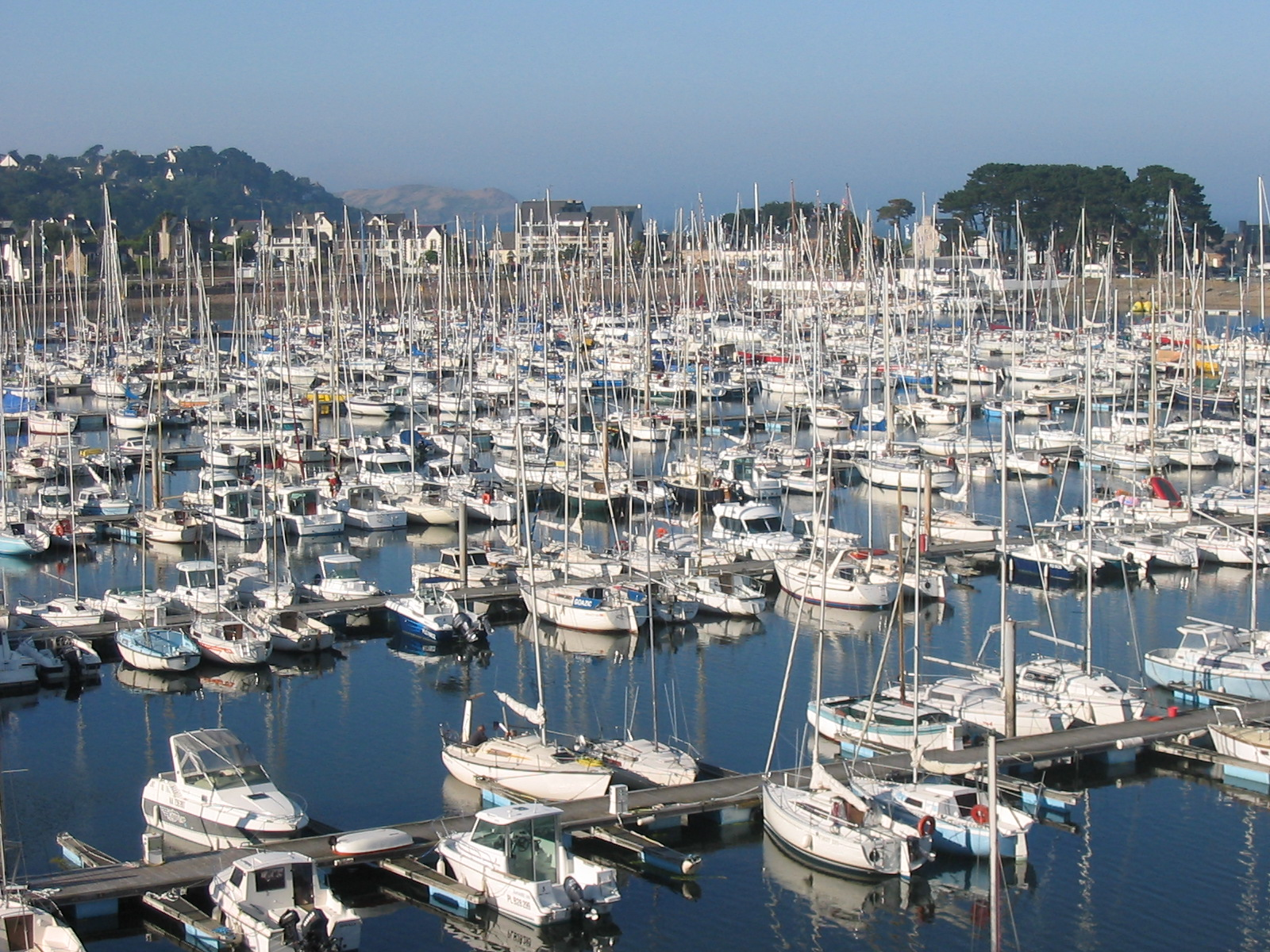 porto di Perros-Guirec